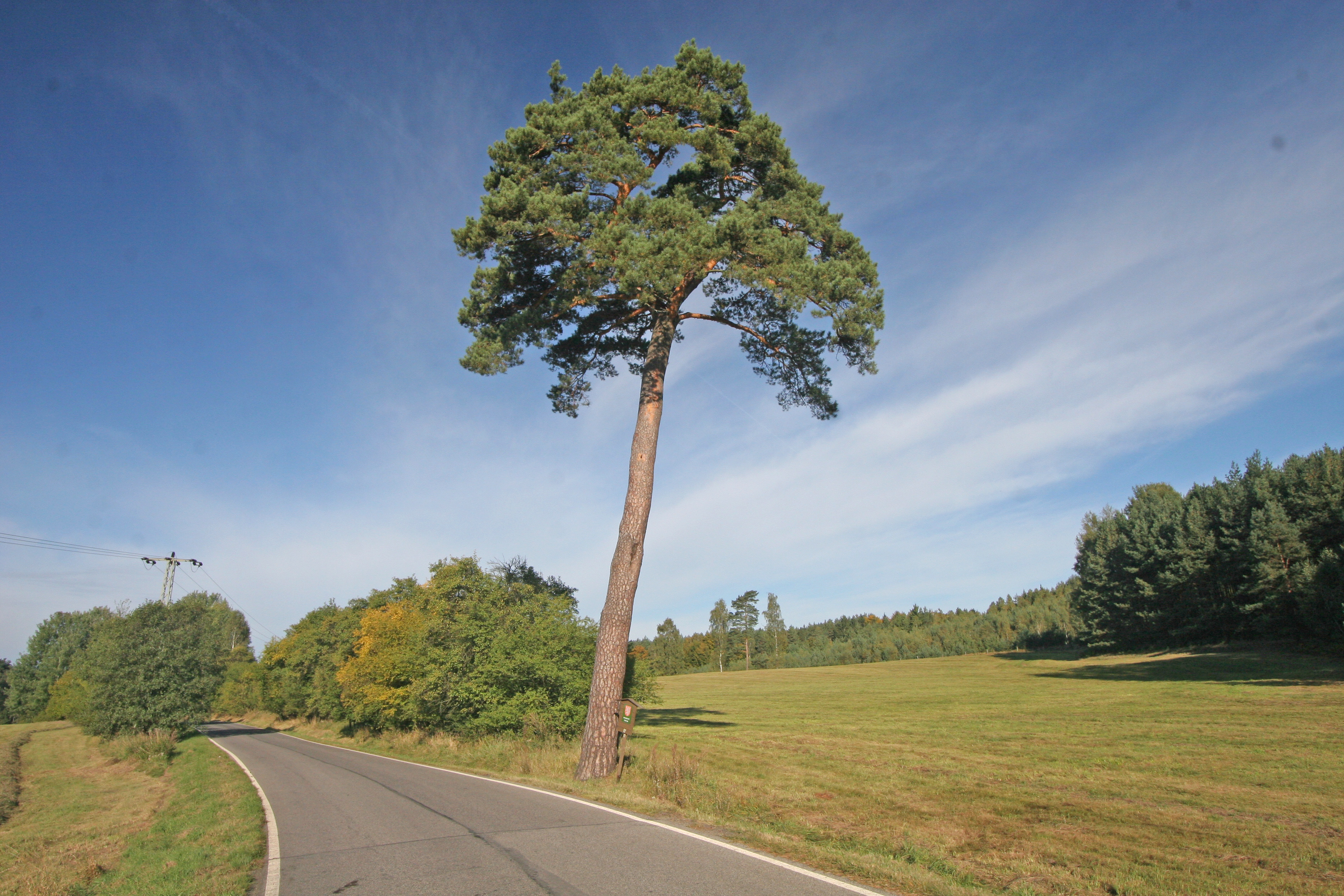 památná borovice u Mařenic